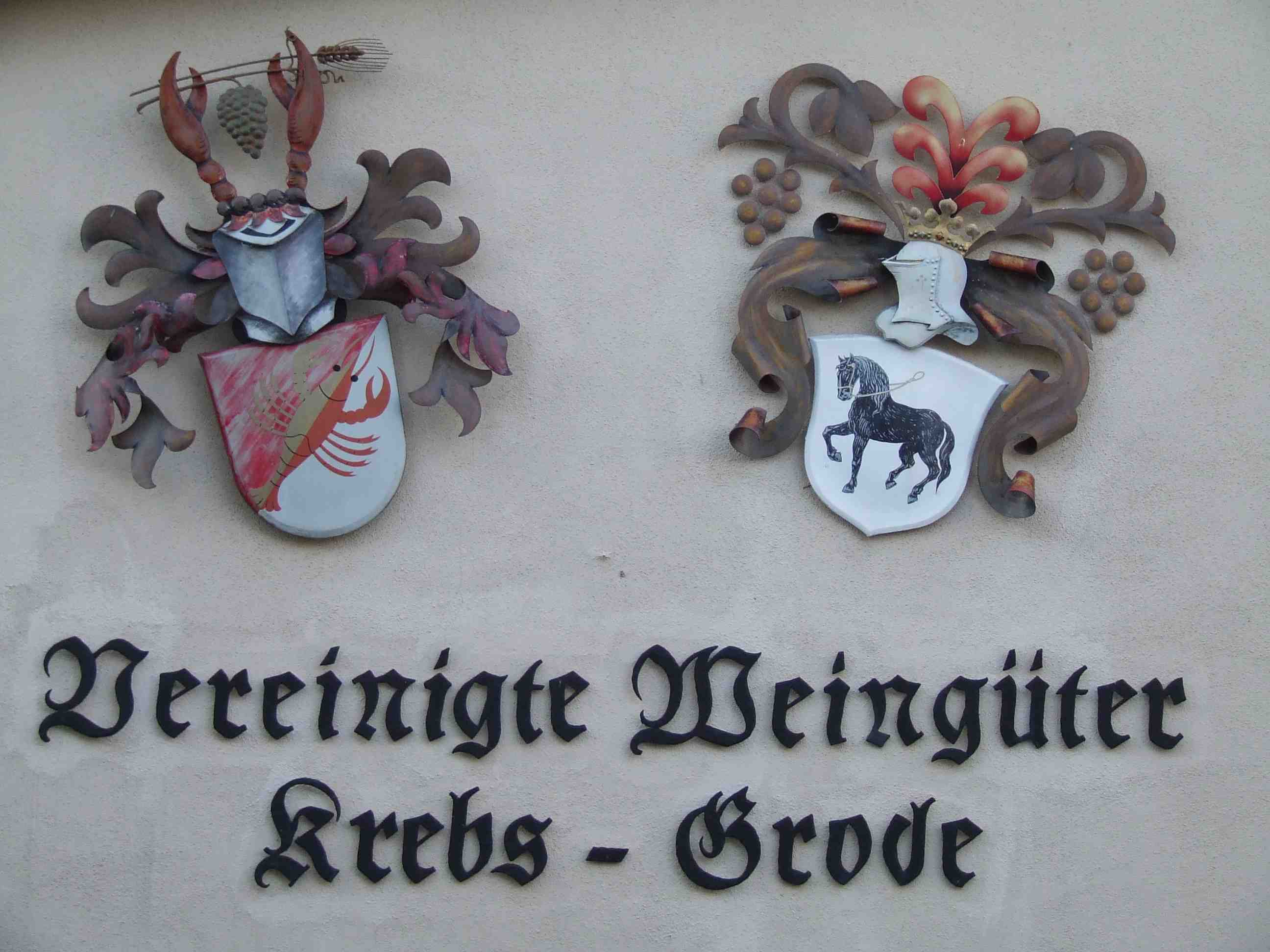 Vereinigte Weingüter Krebs-Grode hier Wappen am Weingut in Eimsheim